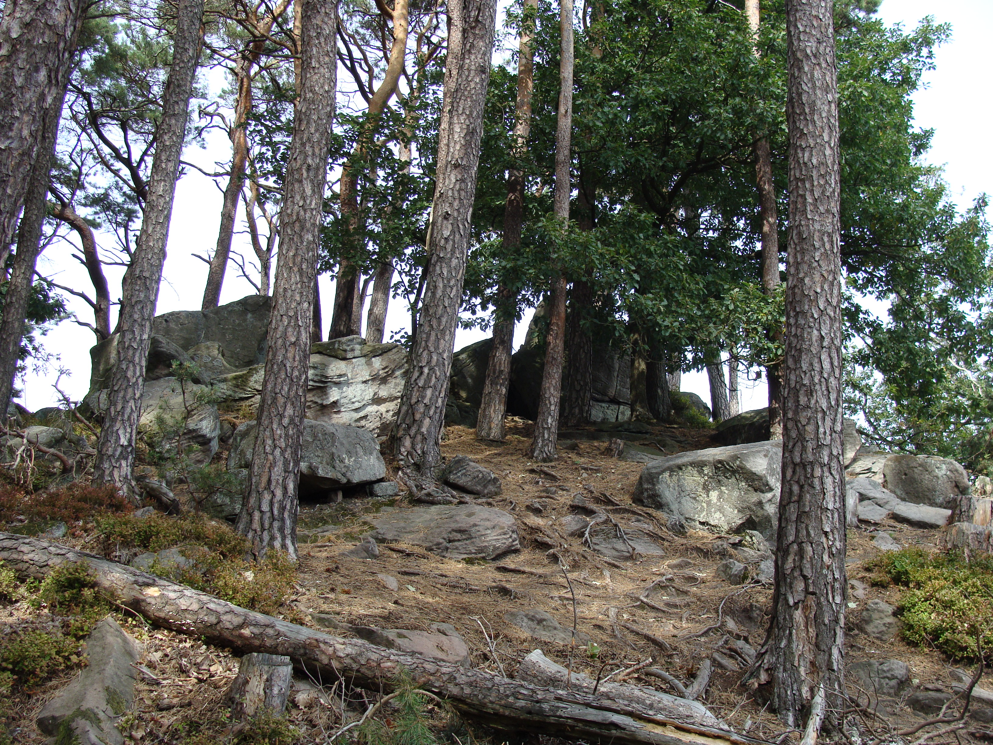 Taubenkopf (Haardt) im Pfälzerwald (604 m) - Gipfel